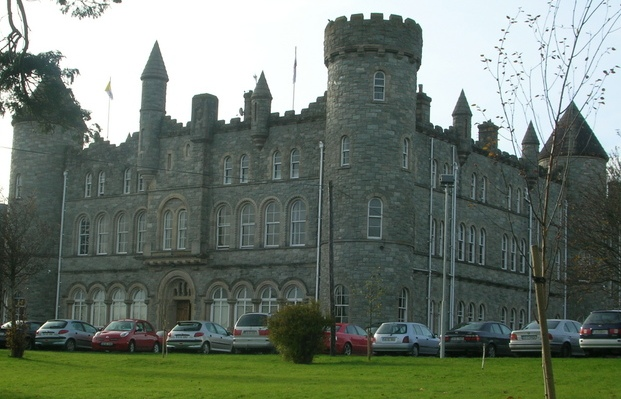 Saint Eunan's College